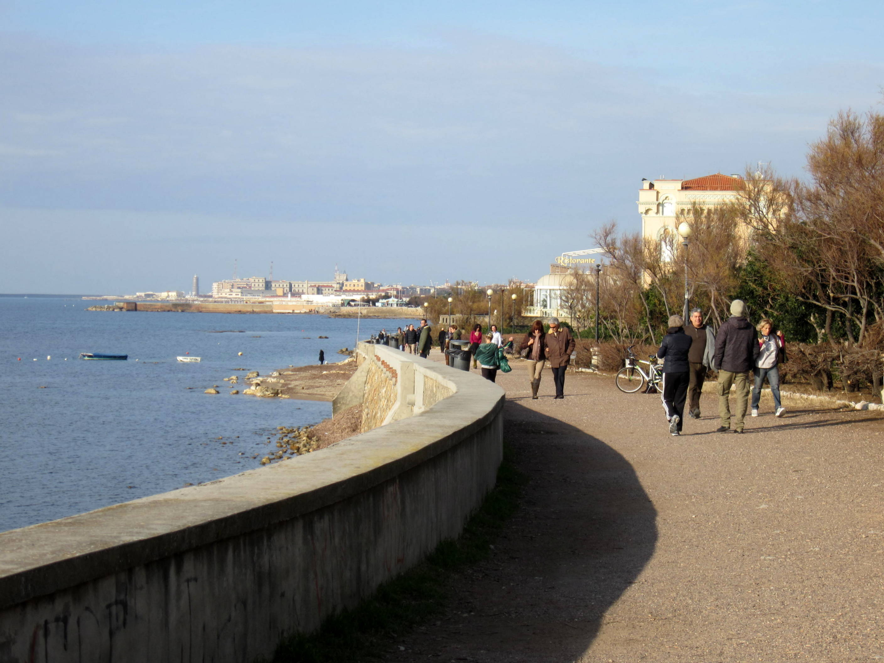 Lungomare di Livorno presso Antignano